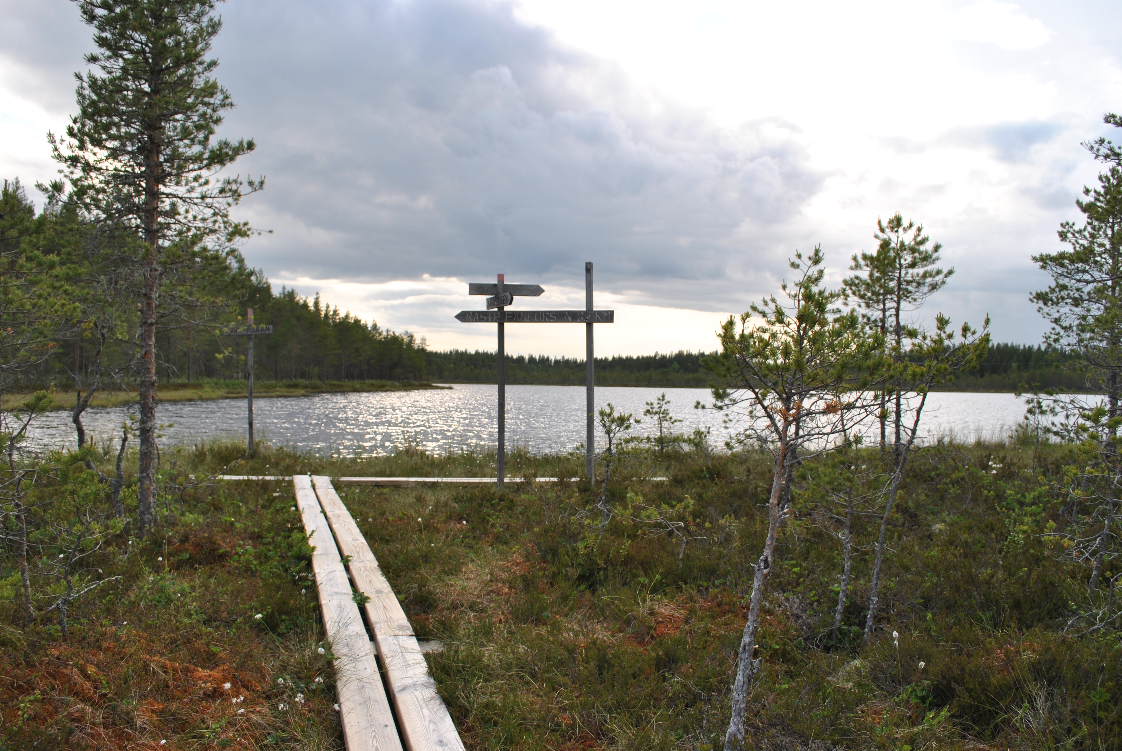 Gröntjärnen, Floda socken, Dalarna vid midsommartid 2015